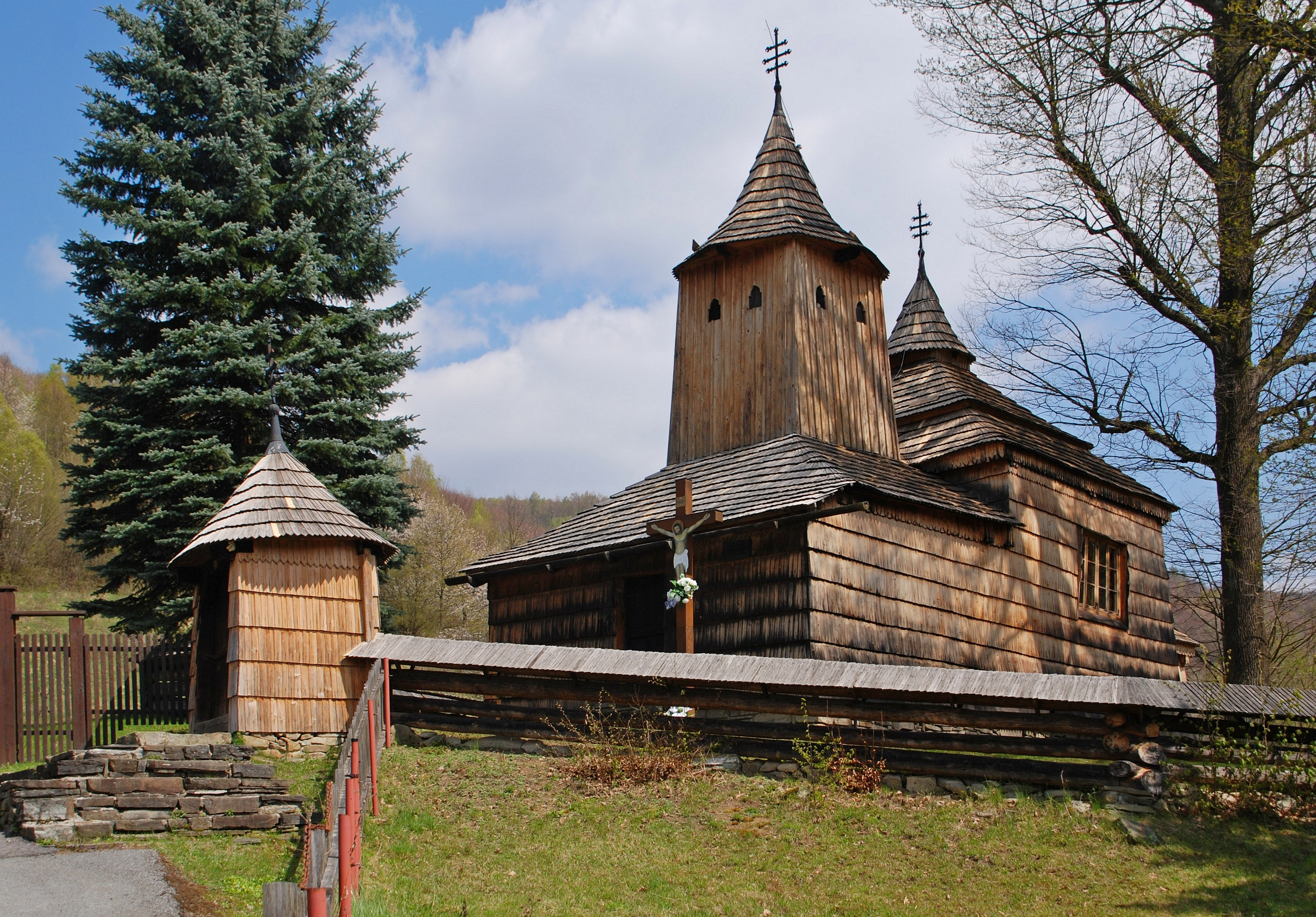 wieś Krajné Čierno